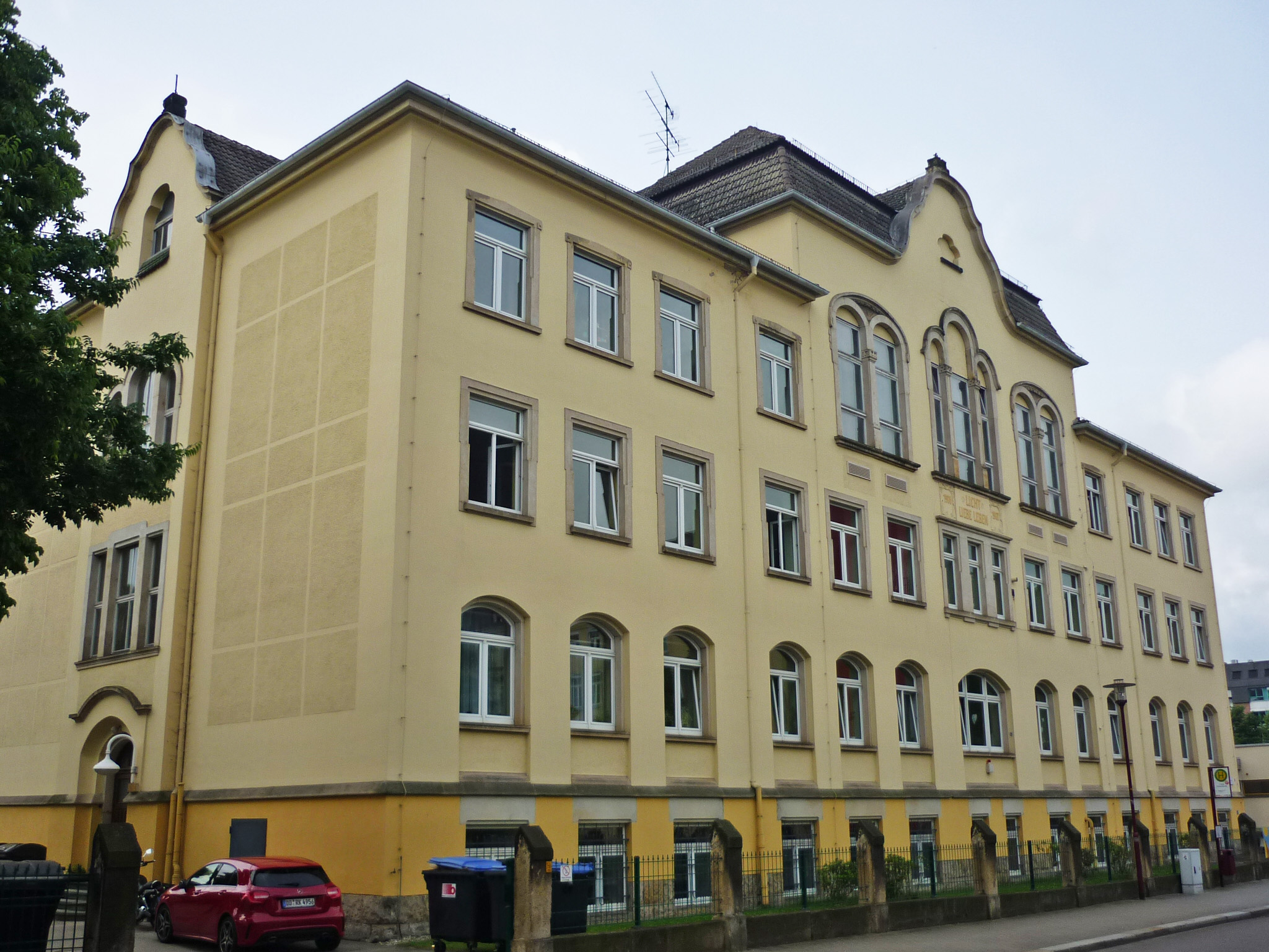 Kroenertstr. 25 in Freital-Deuben